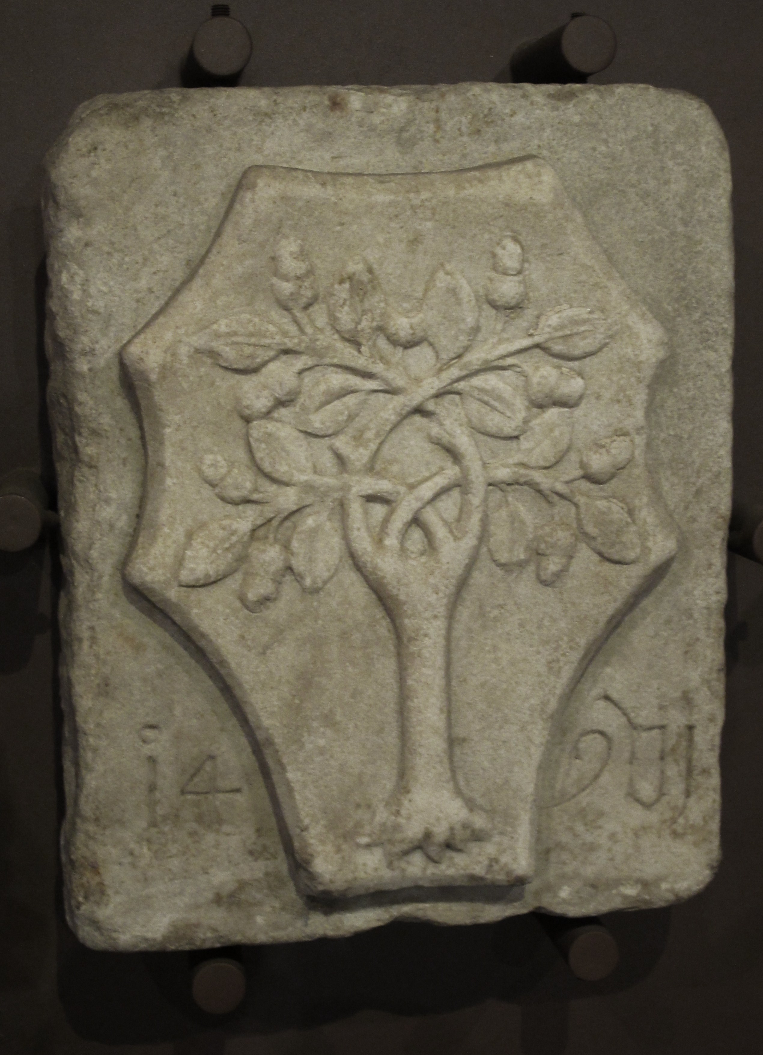 Capitello